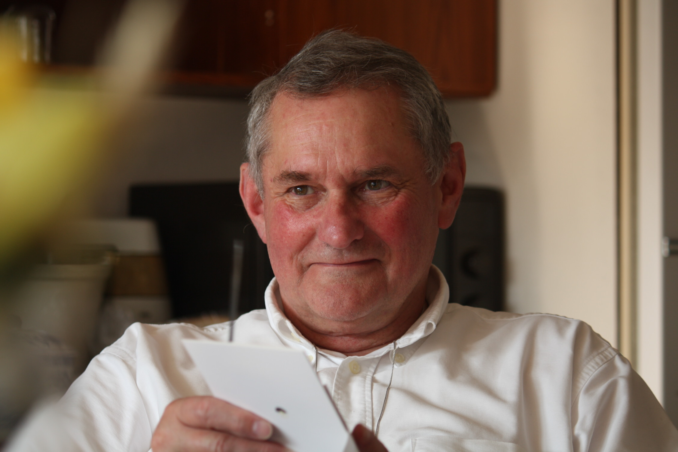 Professor Dr. mult. Kurt Guss